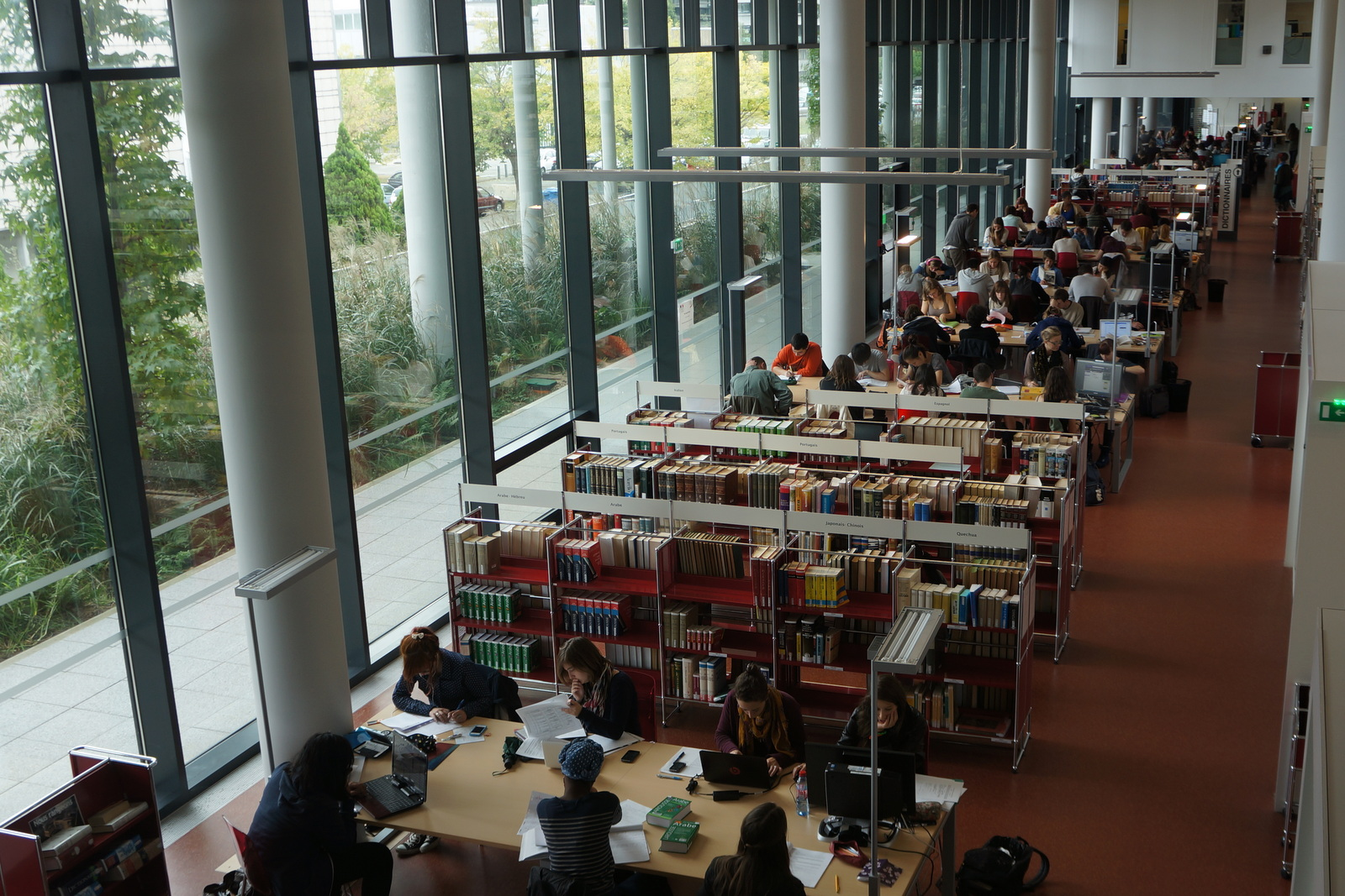 Centre de Ressources des Langues - Université Toulouse Le Mirail